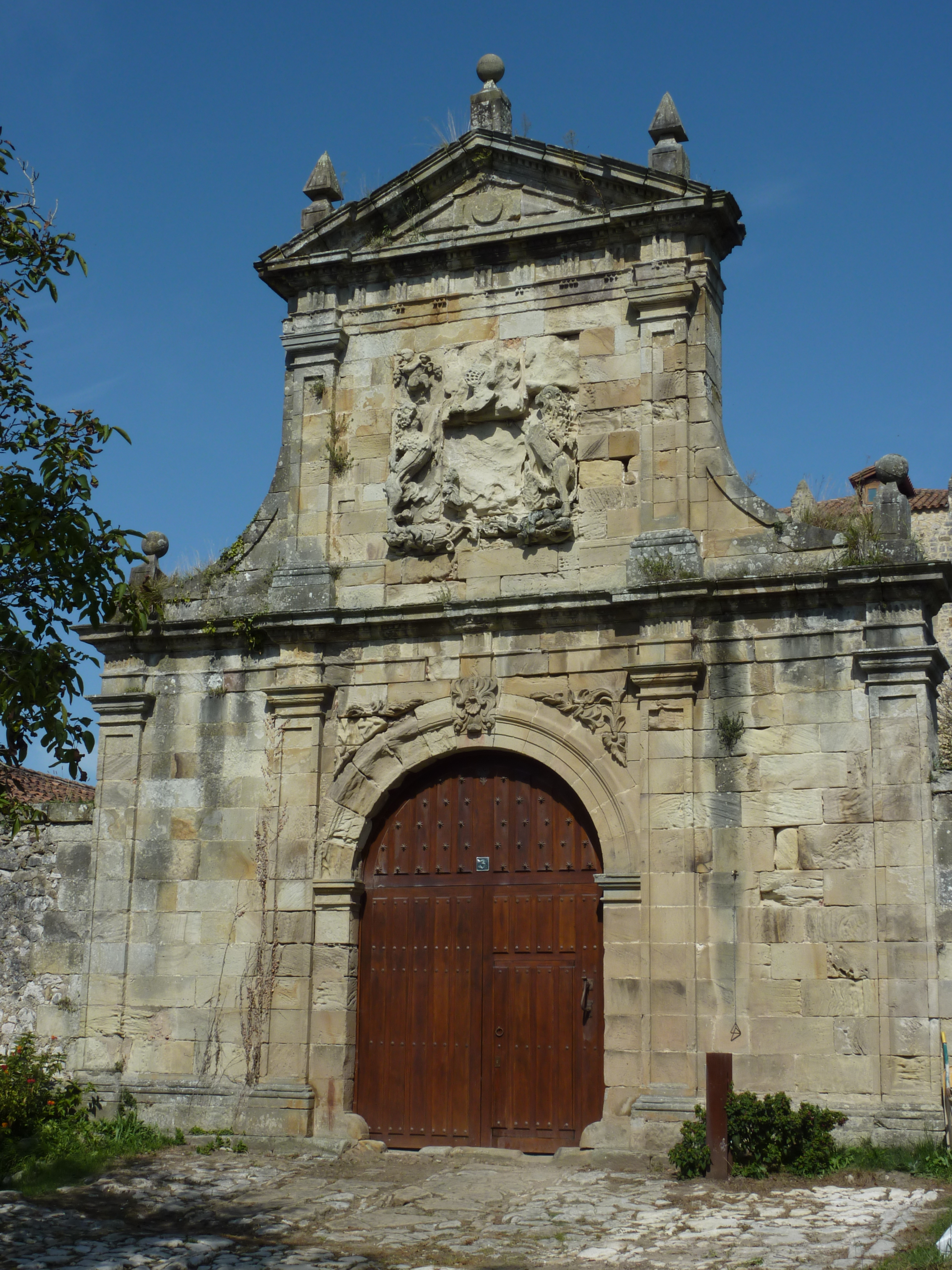 Portada.